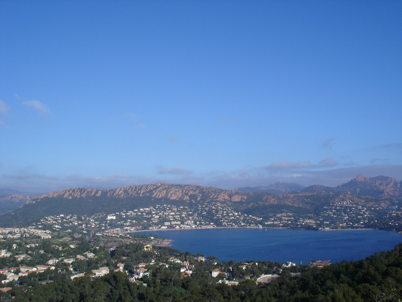 Description : rade d'Agay (Var, France), rastel d'Agay dans le massif de l'Esterel Source : œuvre personnelle Date : janvier 2007 Auteur : Idarvol Licence : GNU Free Documentation License ou Creative Commons Paternité – Partage des conditions initiales à l'identique 2.0 France au choix